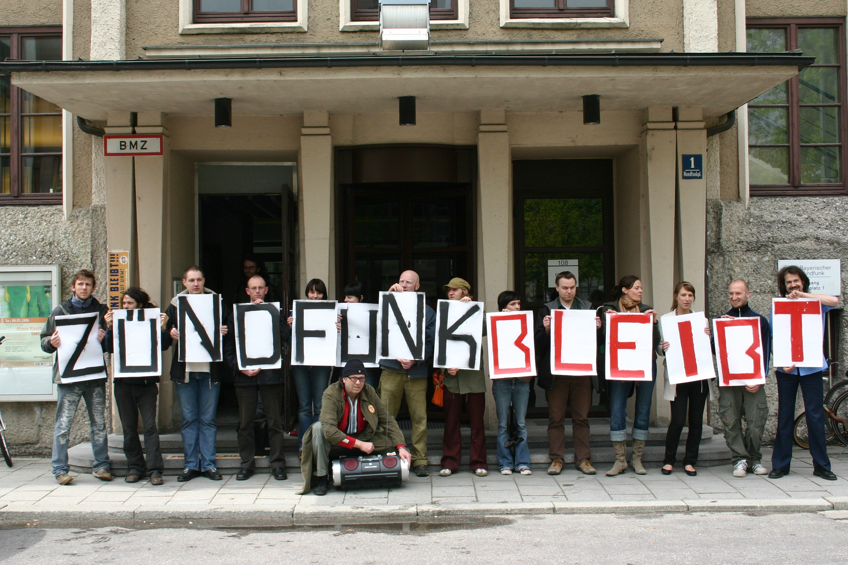 Demonstration vor dem Funkhaus des Bayerischen Rundfunks am 27.04.2006